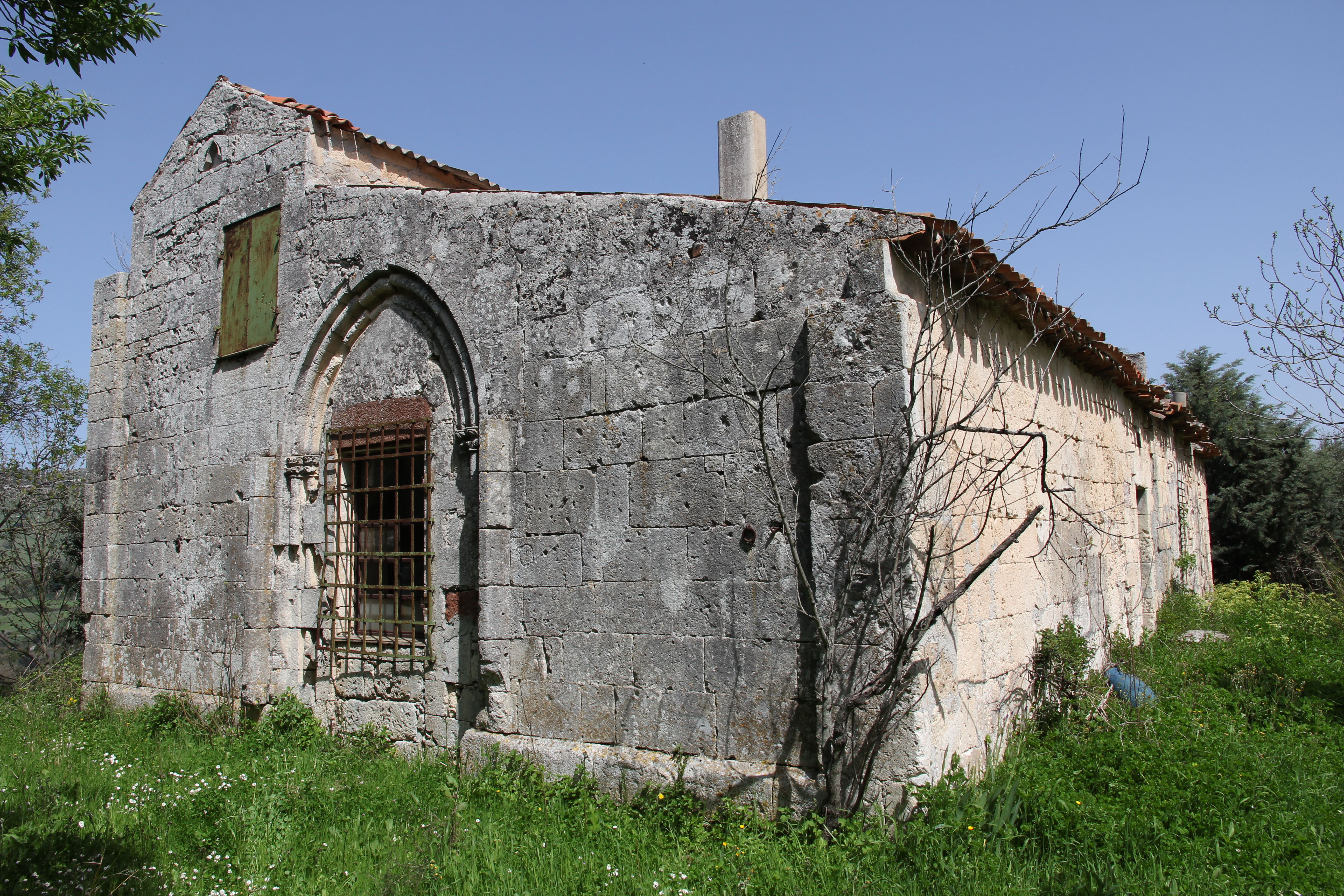 Florinas - Chiesa romanica di San Leonardo